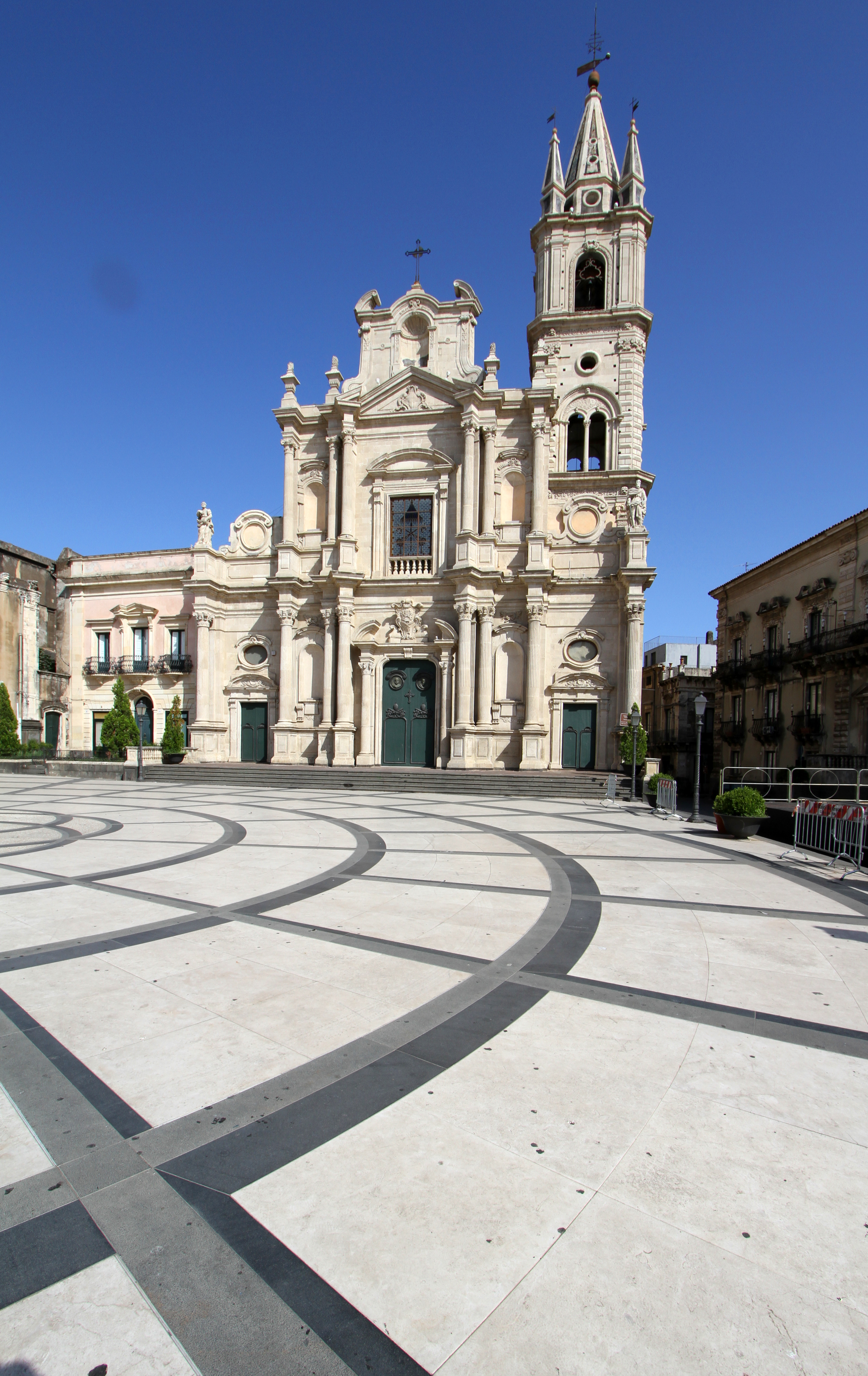 Catania: Chiesa dei Santi Pietro e Paolo.